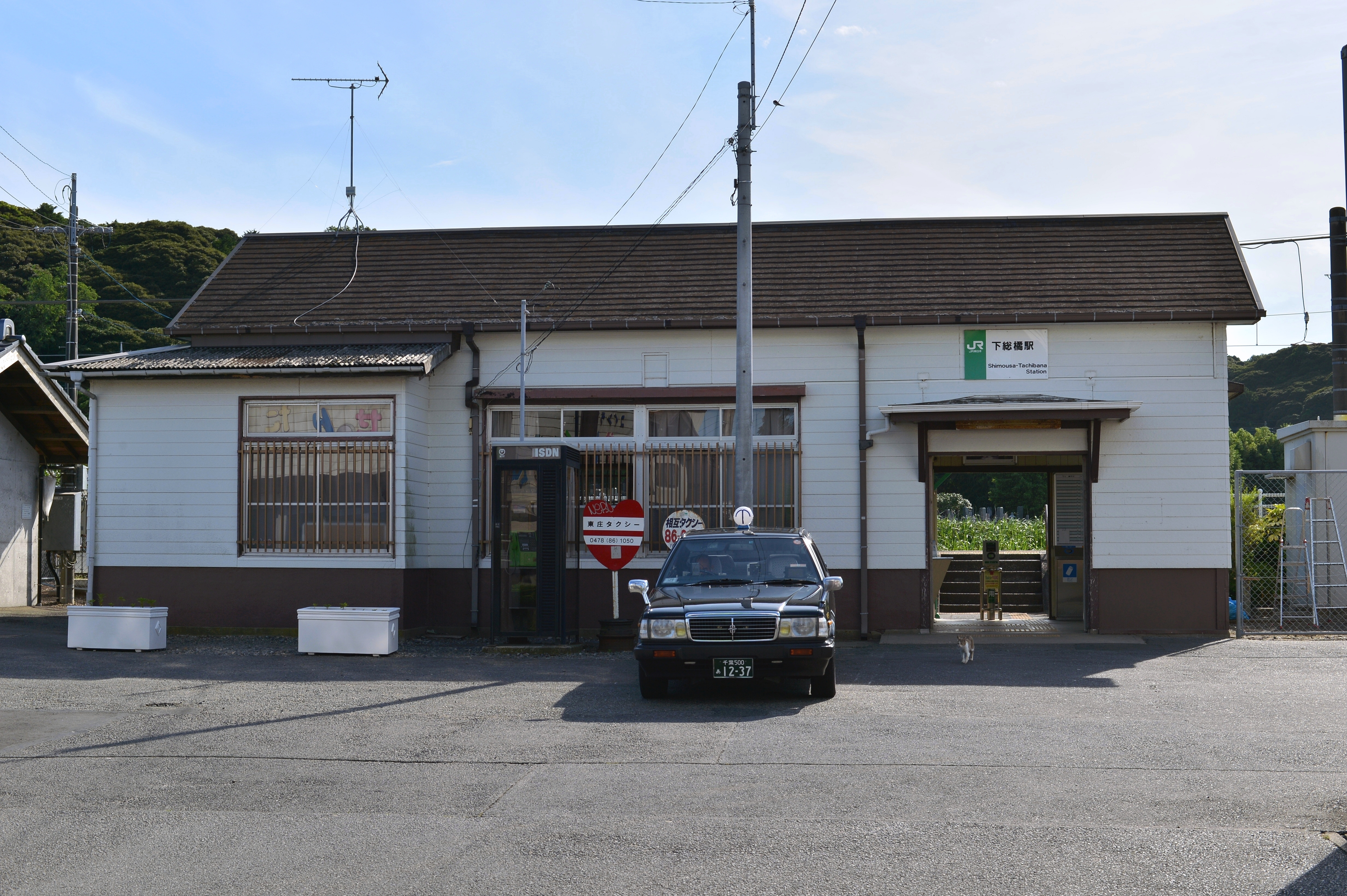 JR下総橘駅の駅舎